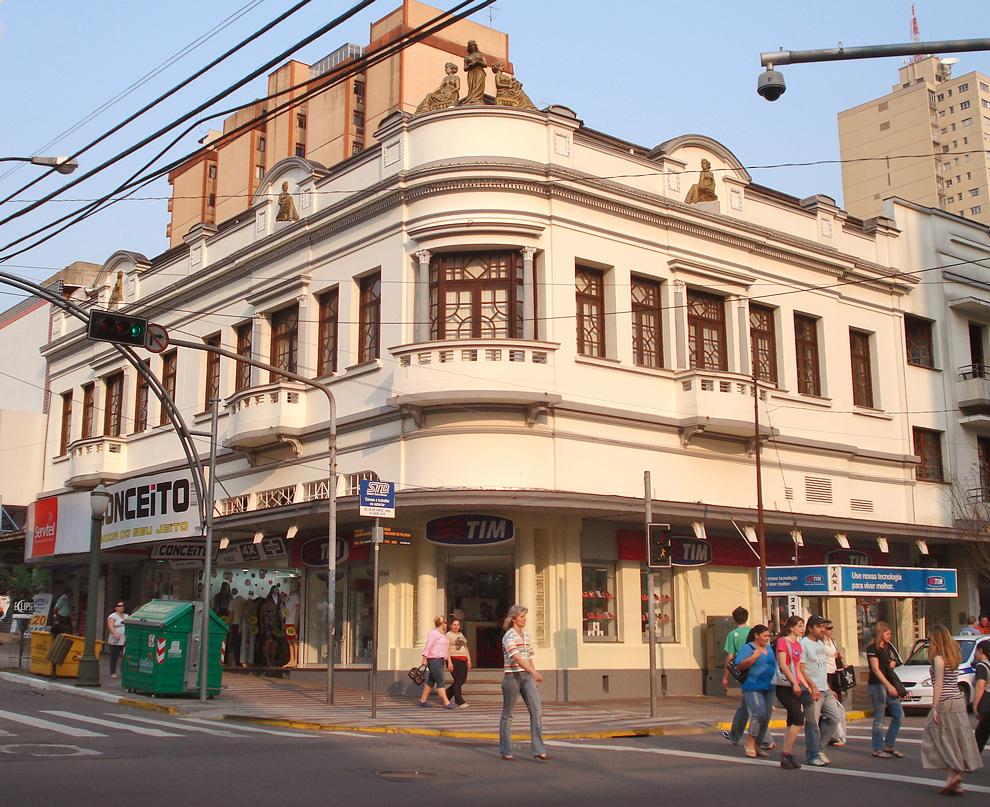 Antiga Livraria Saldanha, em Caxias do Sul, Brasil.